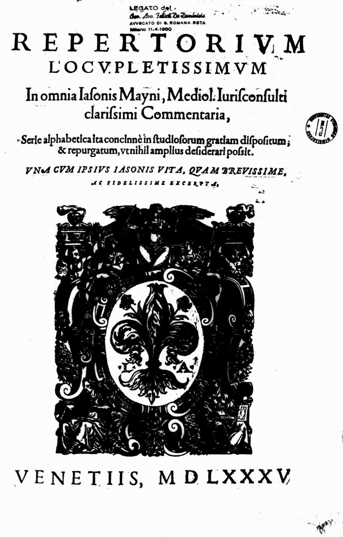 Frontespizio